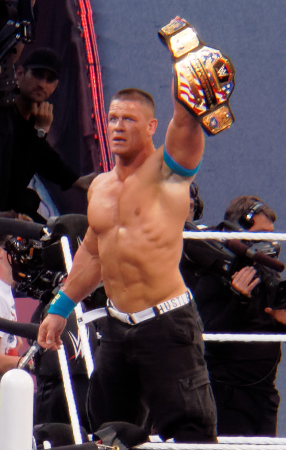 2015-03-29_18-28-18_ILCE-6000_8859_DxO